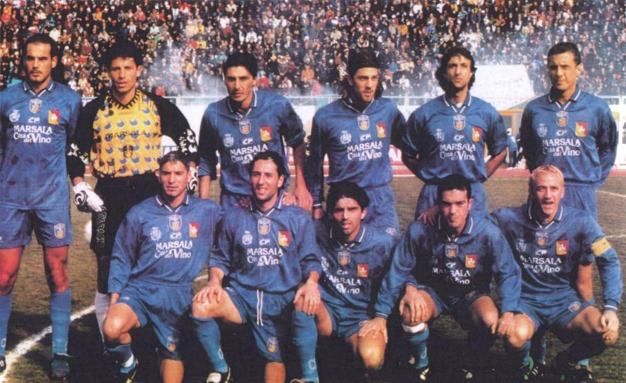 Il Marsala 1912 promosso in C1 nel 1998.